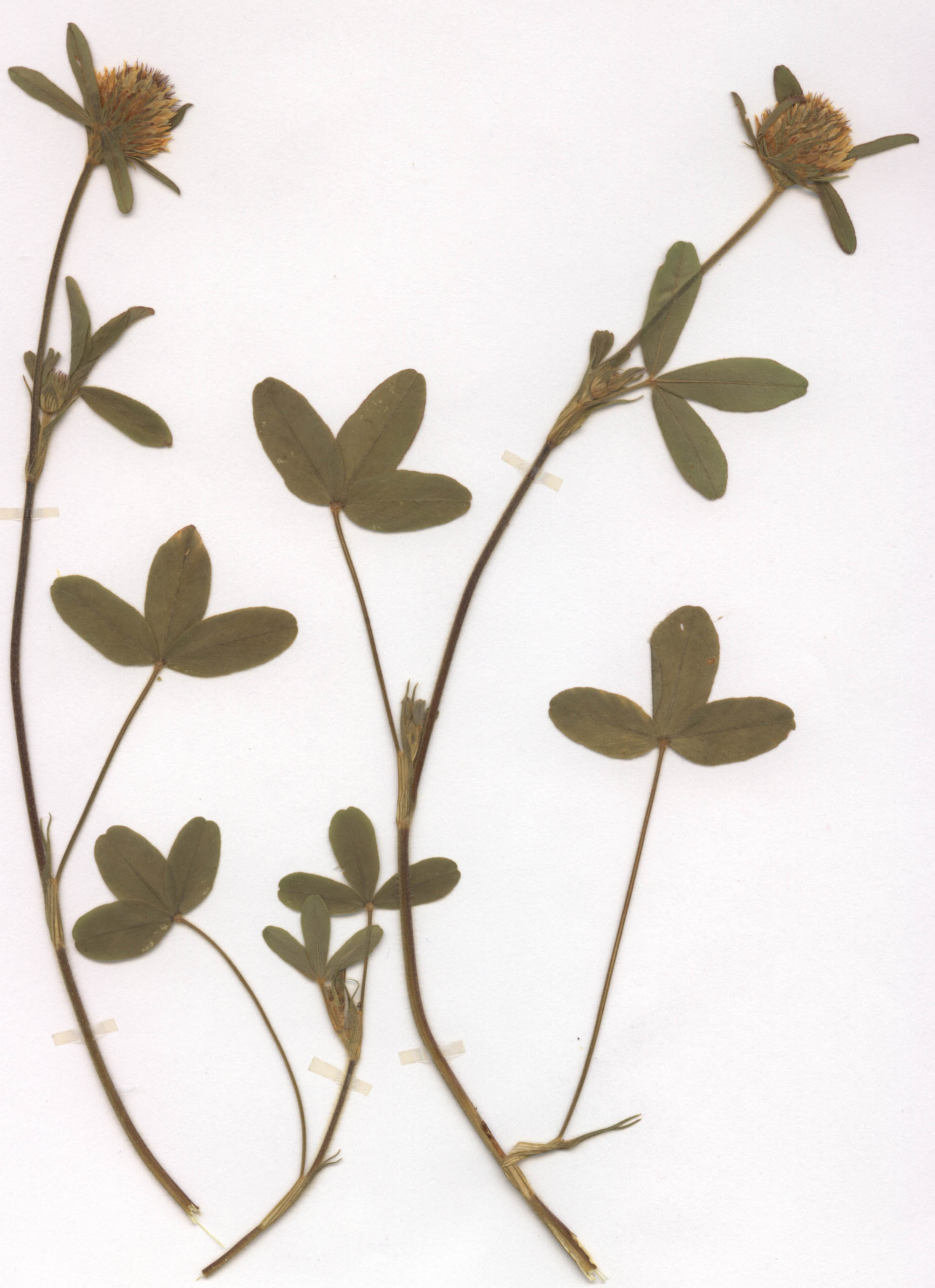 Trifolium ochroleucon, eigener Herbarbeleg